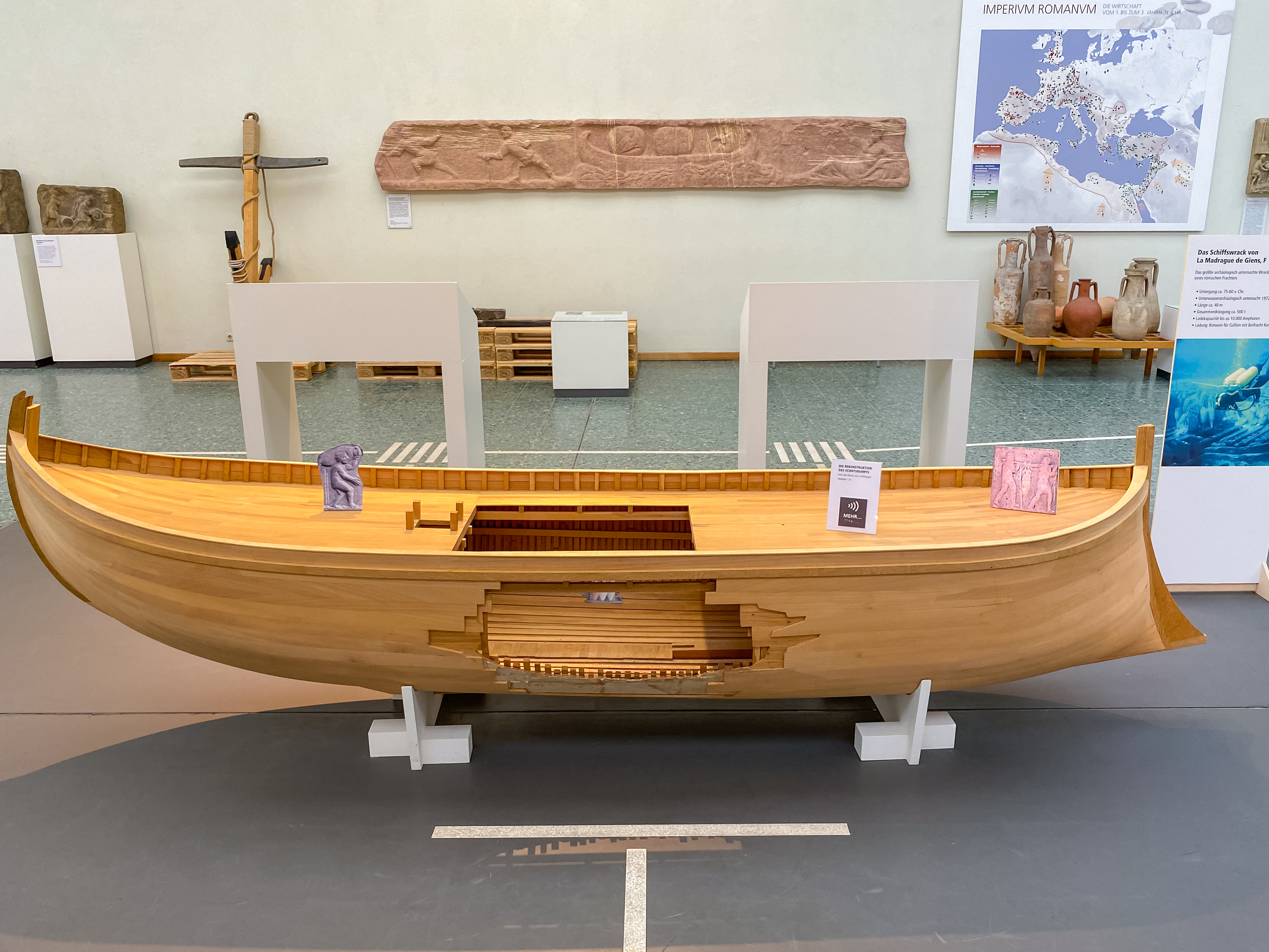 Mainz